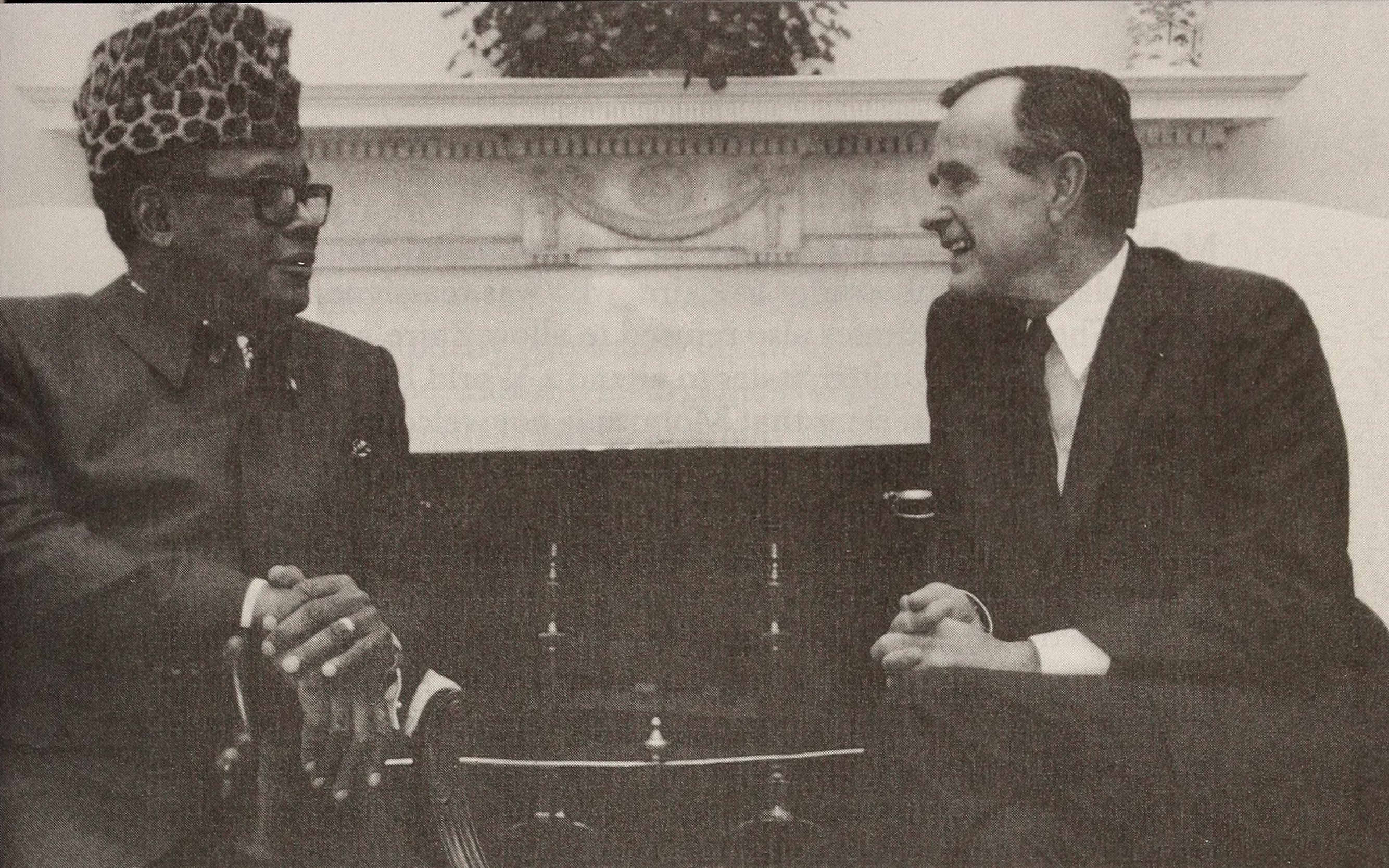 Mobutu meets with President George Bush at the White House, June 1989 Photo courtesy The White House - David Valdez